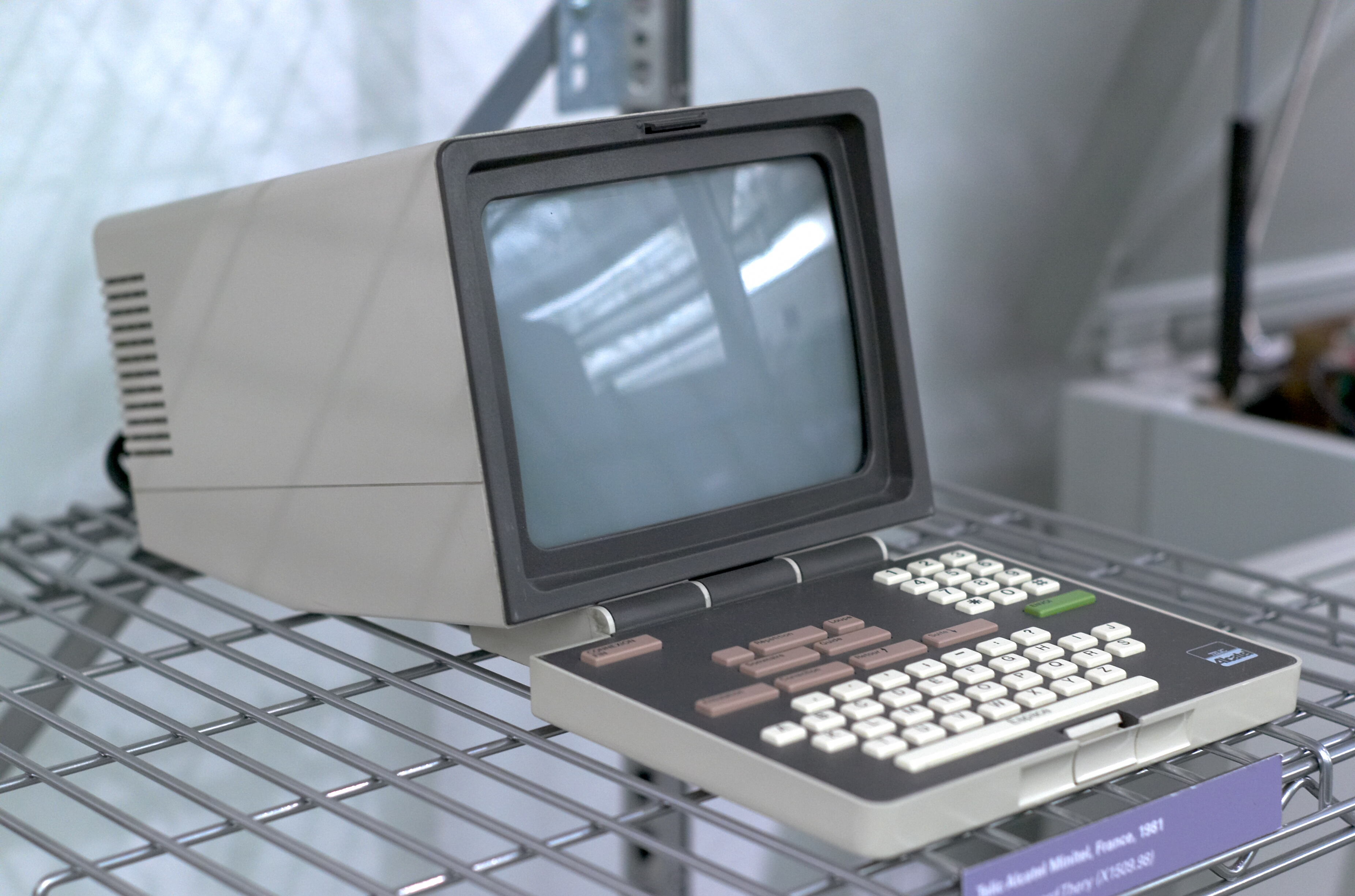 Minitel